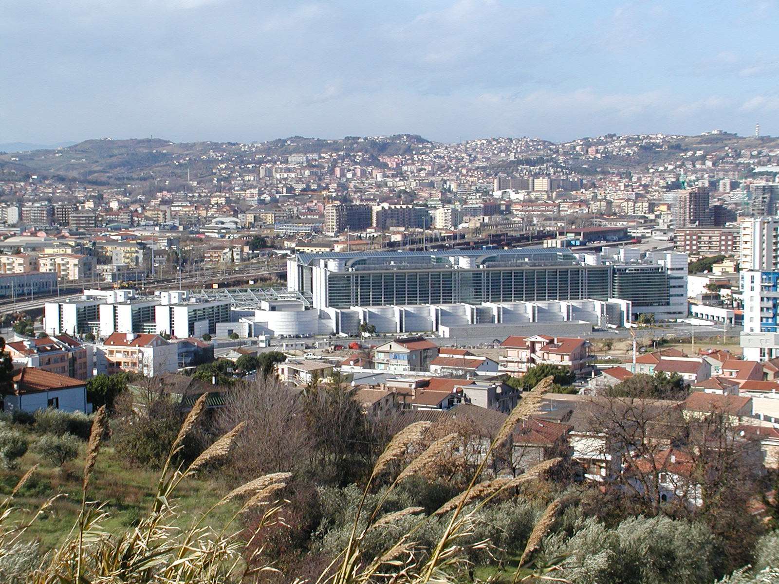 Das neue Gerichtsgebäude